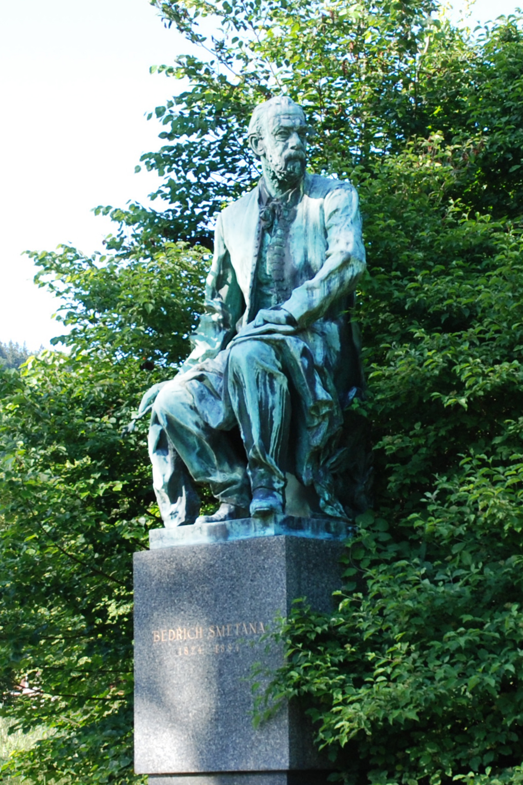 Pomník Bedřicha Smetany v Karlových Varech v parku za Poštovním dvorem